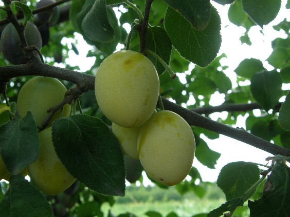 Prunus domestica ssp. Drap d´Or d´Espéren